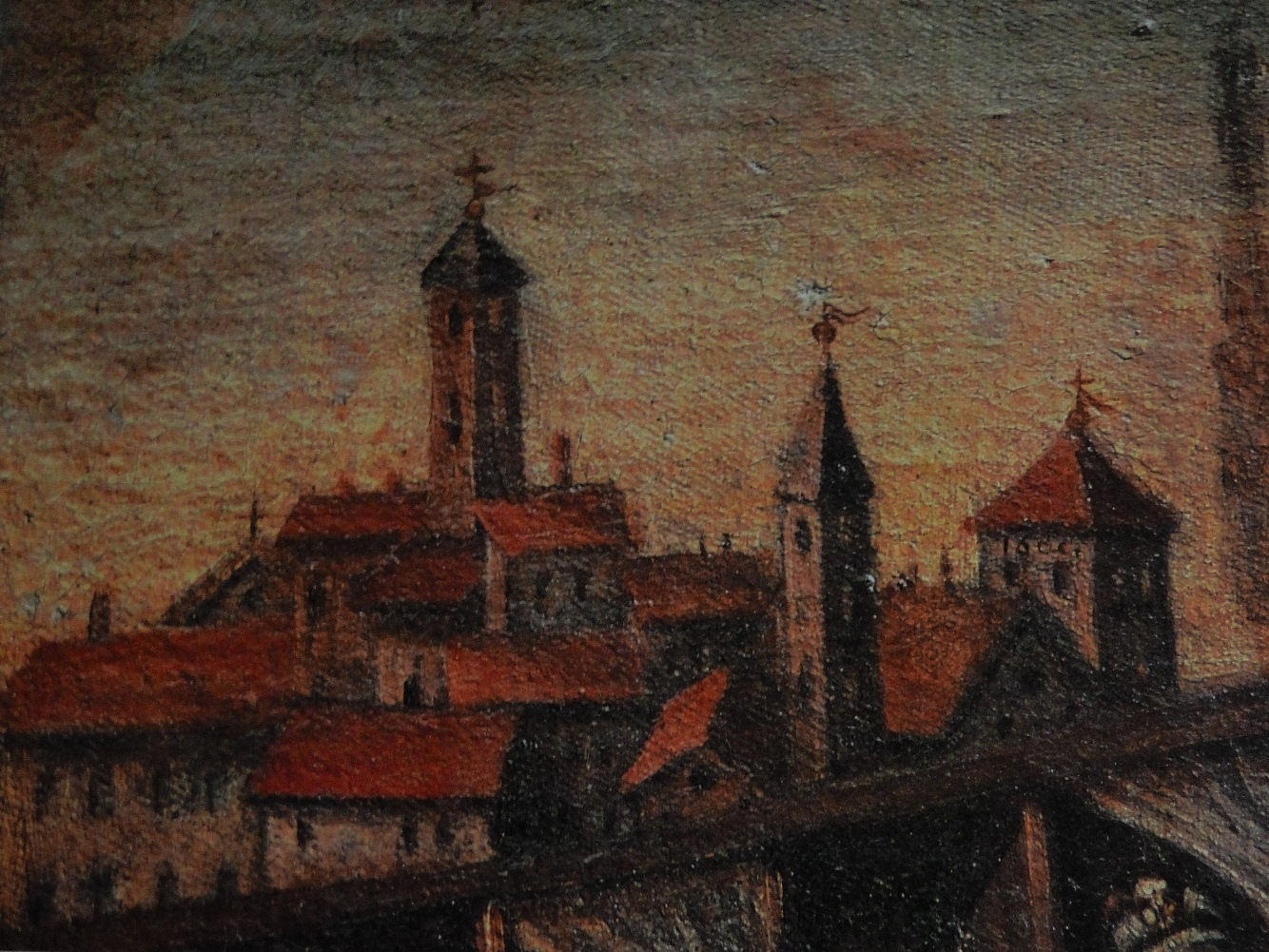 Torre Boldone nel Cinquecento, dal dipinto Impetrazione a Maria contro la peste, opera di Enea Salmeggia. Chiesetta dei Mortini, Torre Boldone (Bergamo), Italia